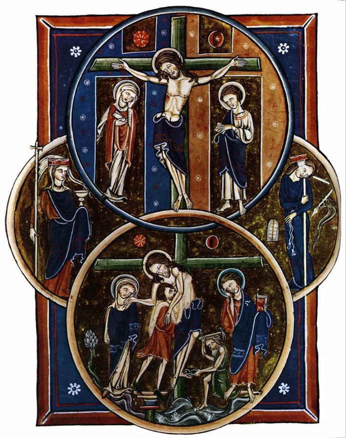 Žaltář Blanky Kastilské